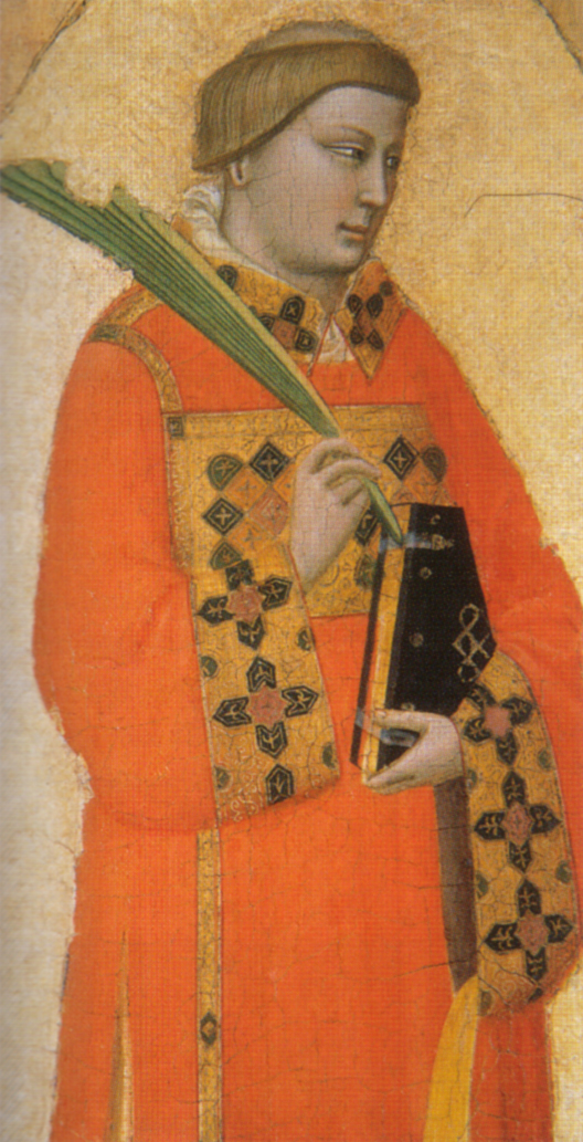 Bernardo Daddi, San Lorenzo, Pinacoteca di Brera, Milan